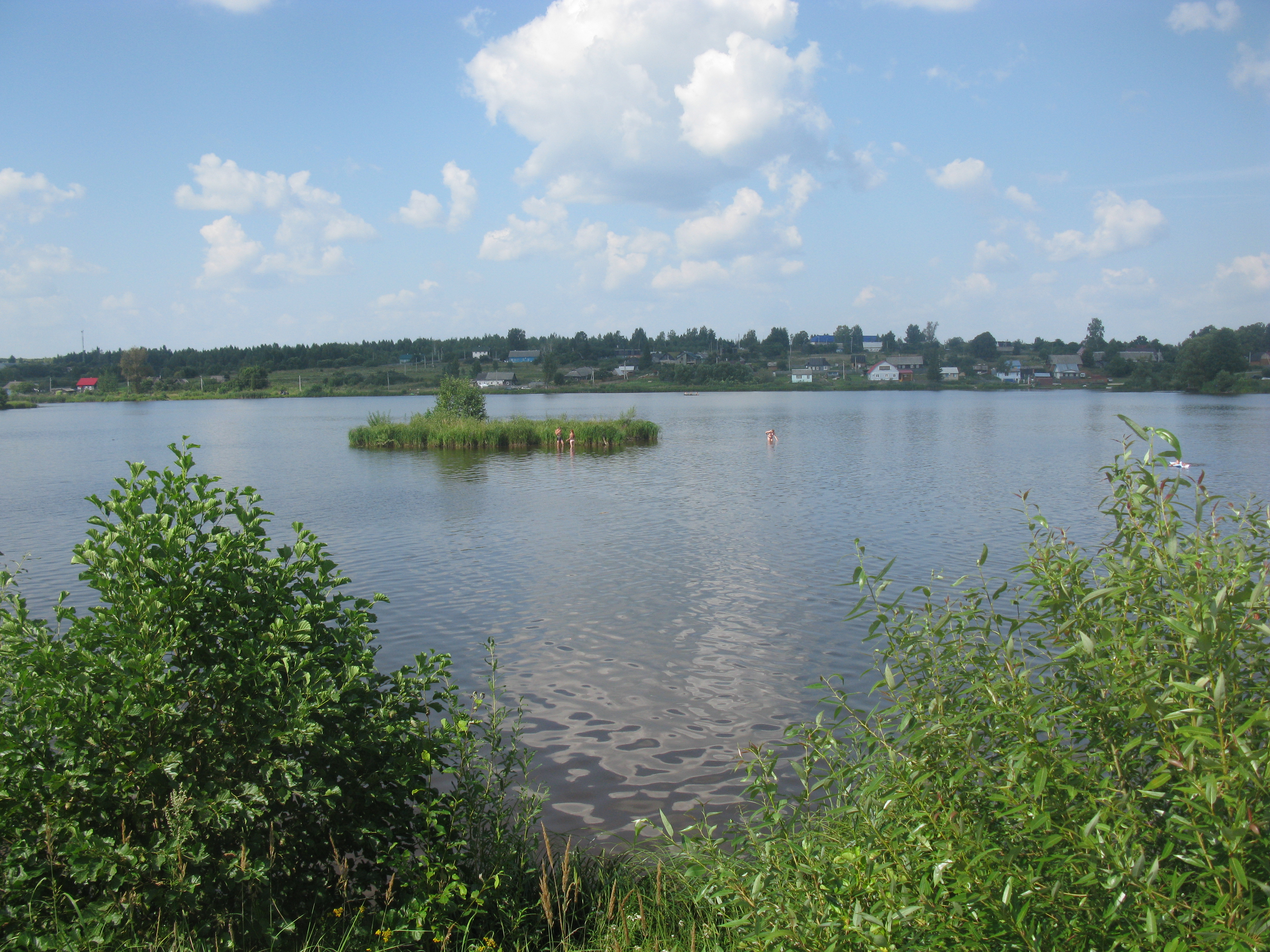 Пруд в с.Хотьково